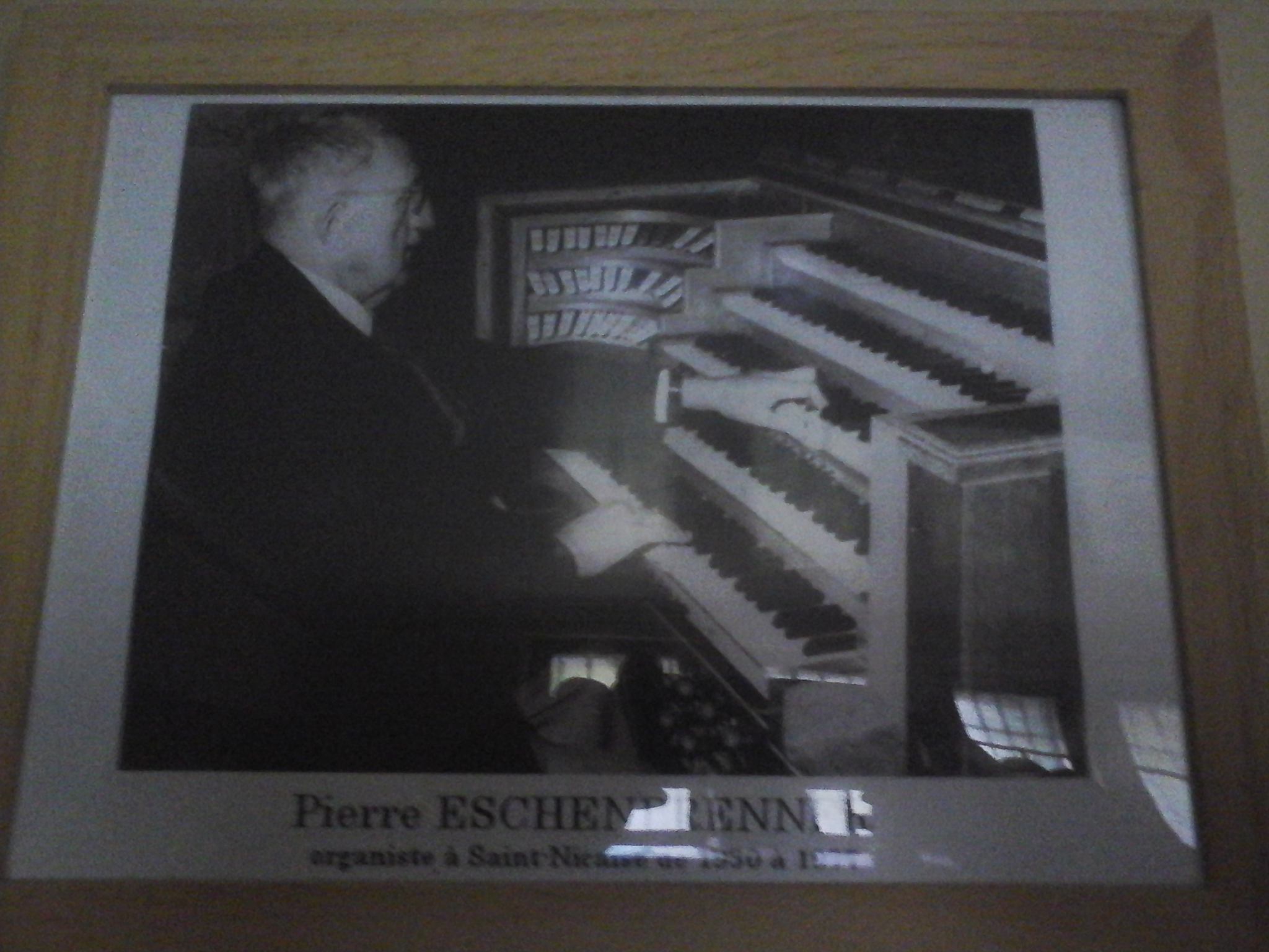 La console de l'orgue de Saint Nicaise, quand il avait ses 5 claviers